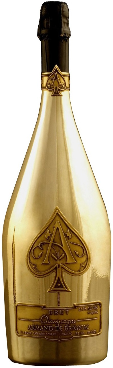 Meine Armand de Brignac Flasche fotografiert mit transparentem Hintergrund.